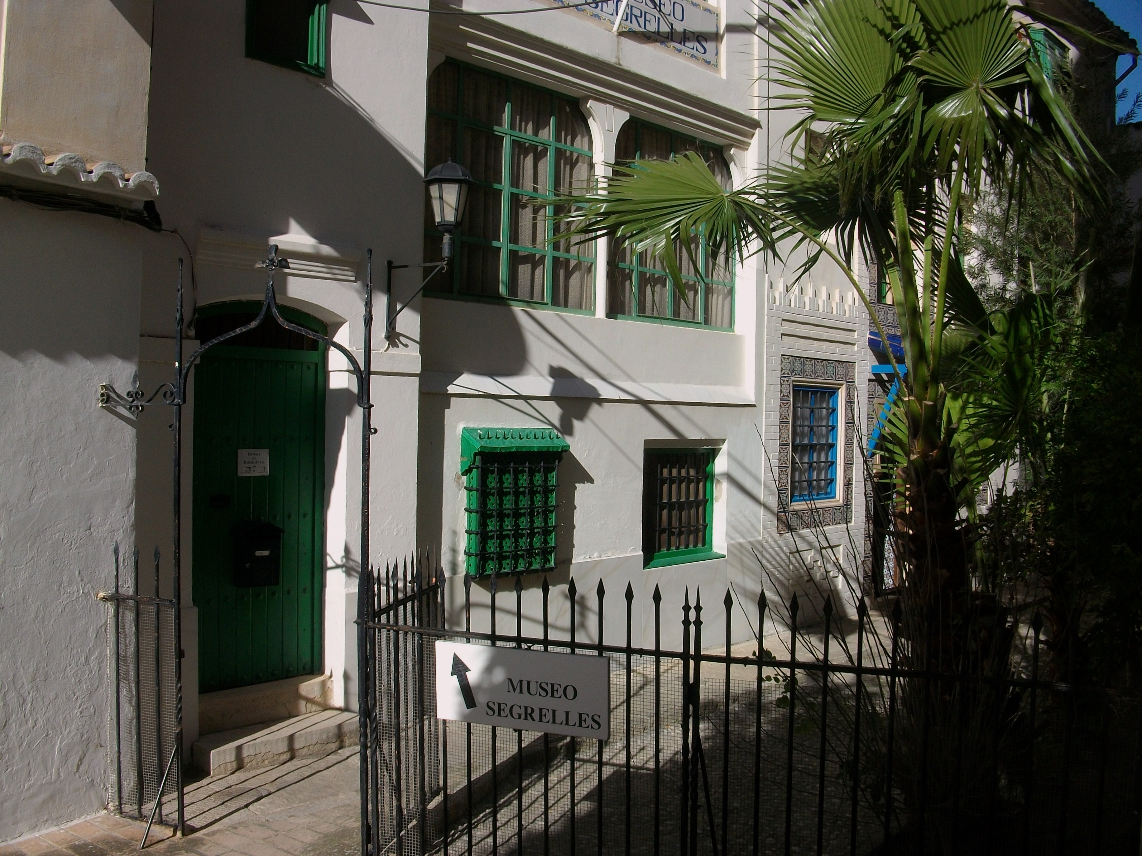 Museu Segrelles d'Albaida.